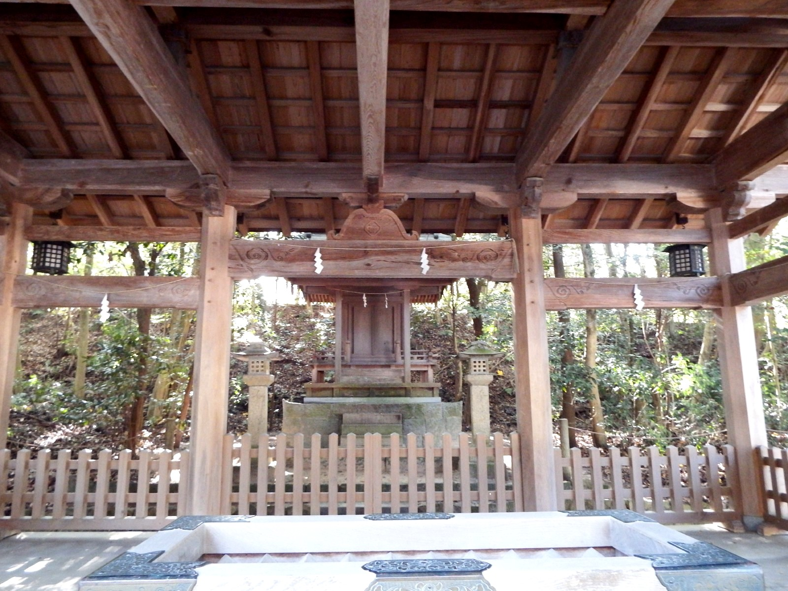 大山祇神社 葛城神社・祓殿神社・伊予国総社